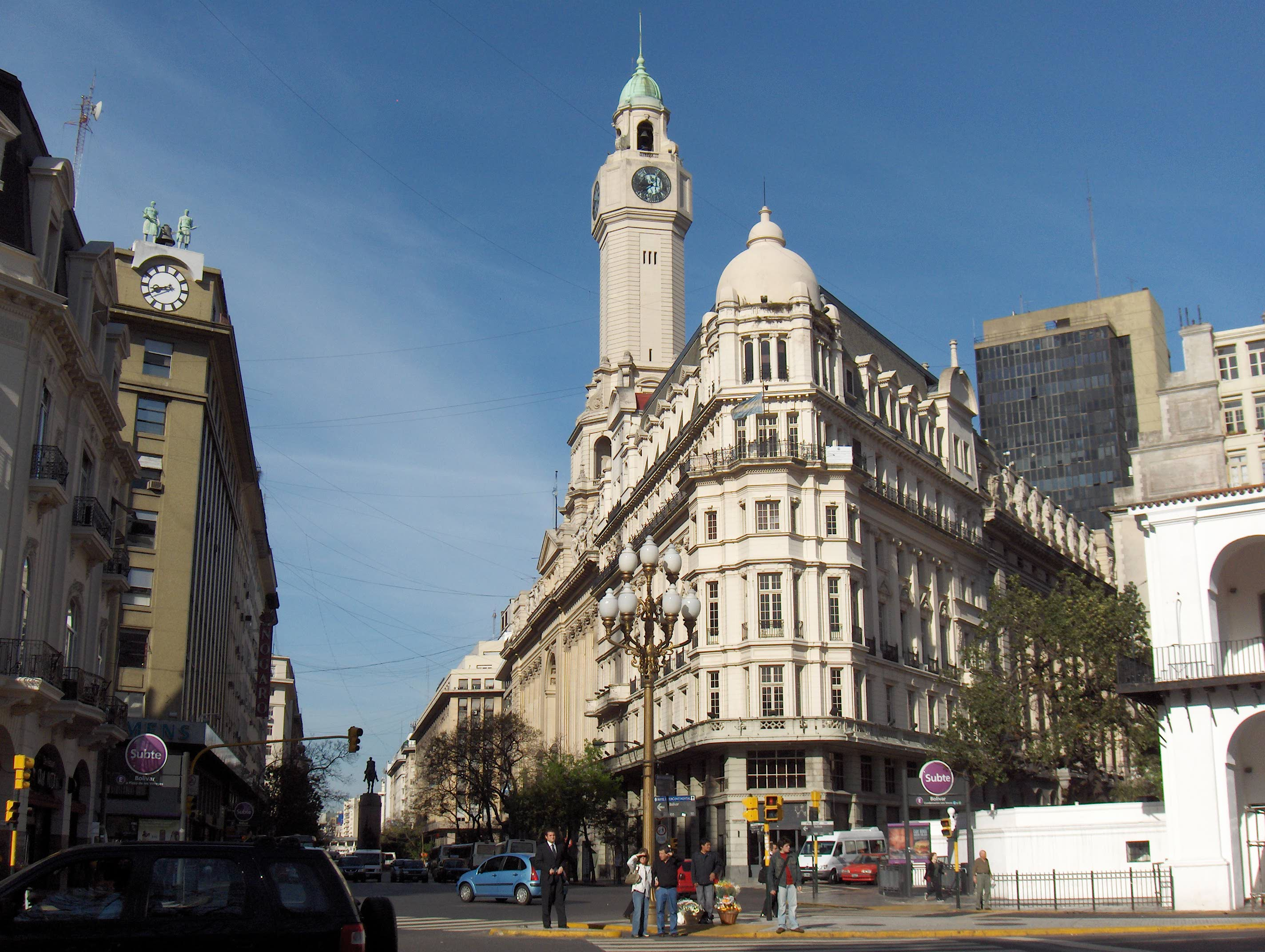 Diagonal Sur, Ciudad Buenos Aires, Argentina.